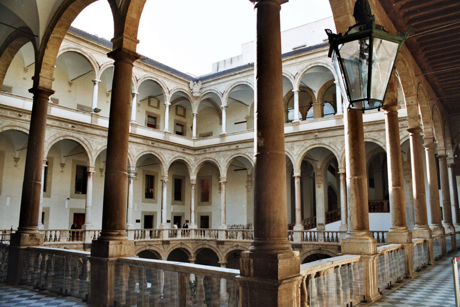 Palazzo Reale (Palazzo dei Normanni), Palermo. Inner court.